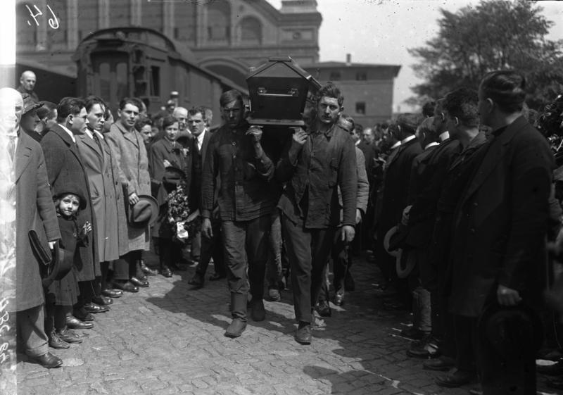 Ueberführung des in Lausanne ermordeten russischen Botschafters in Rom Worowski über Berlin nach Moskau. Arbeiter tragen den Sarg zum Leichenwagen.